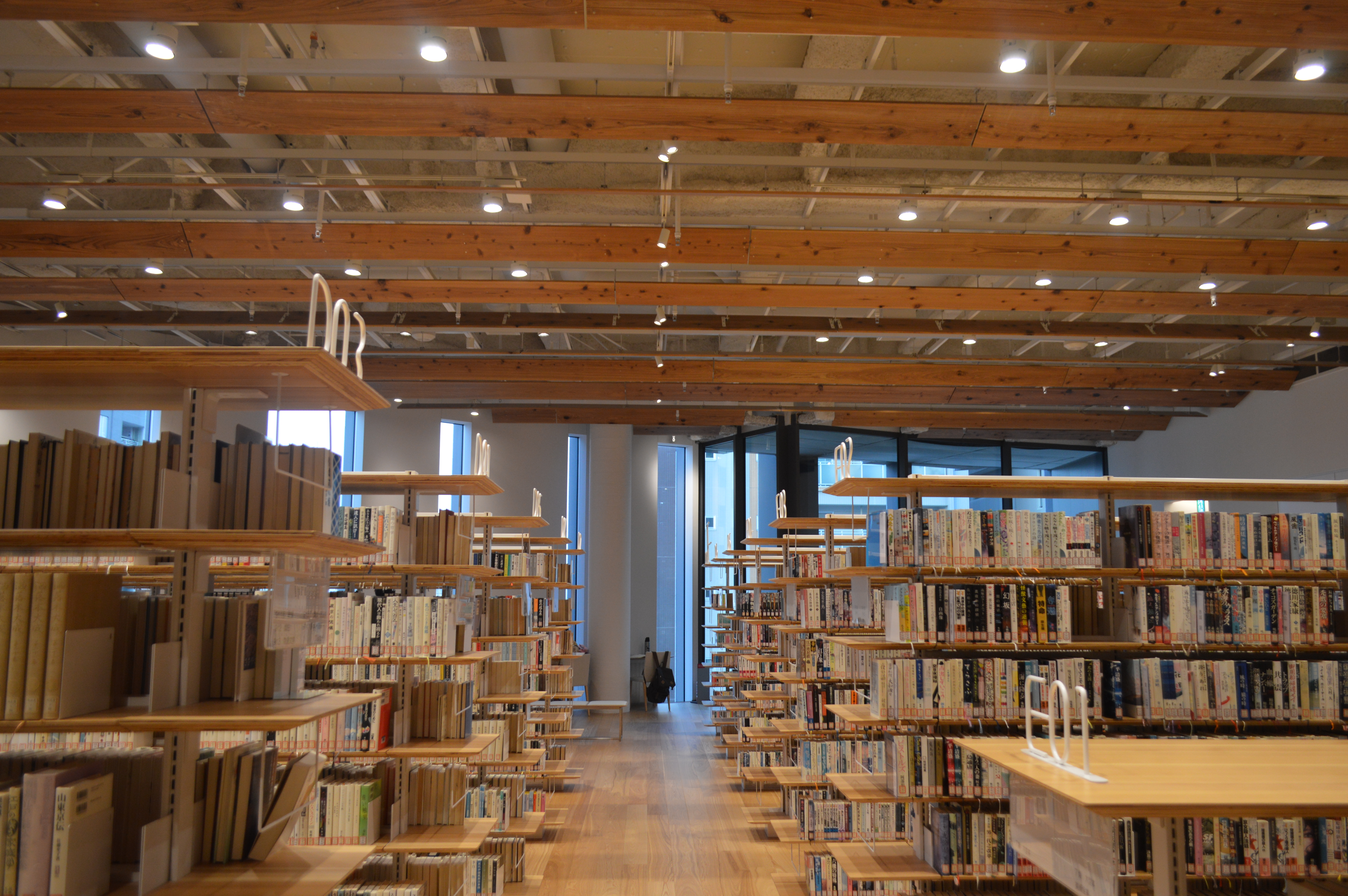 TOYAMAキラリ4階の富山市立図書館本館。